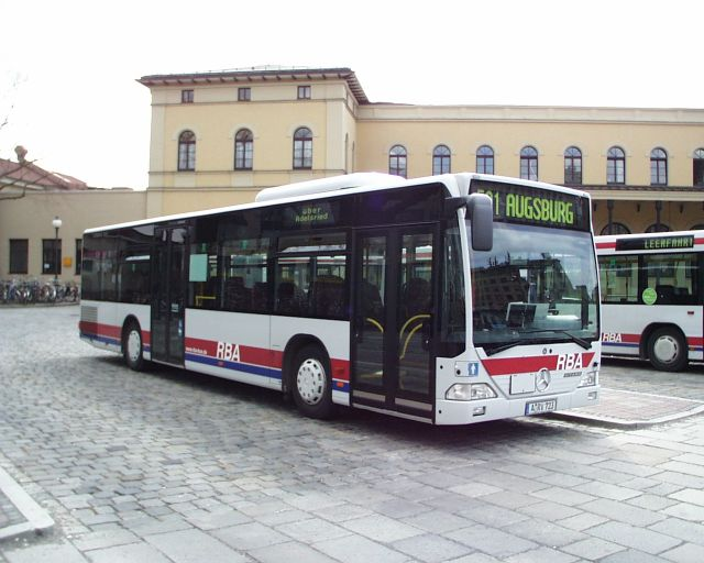 Ein Bus von Mercedes, bei der RBA.